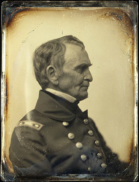 Commodore Charles Morris, daguerreotype